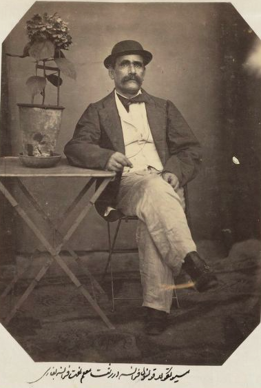 Consul de France à Rasht en Perse. Photo prise par Ali Khan Vali.